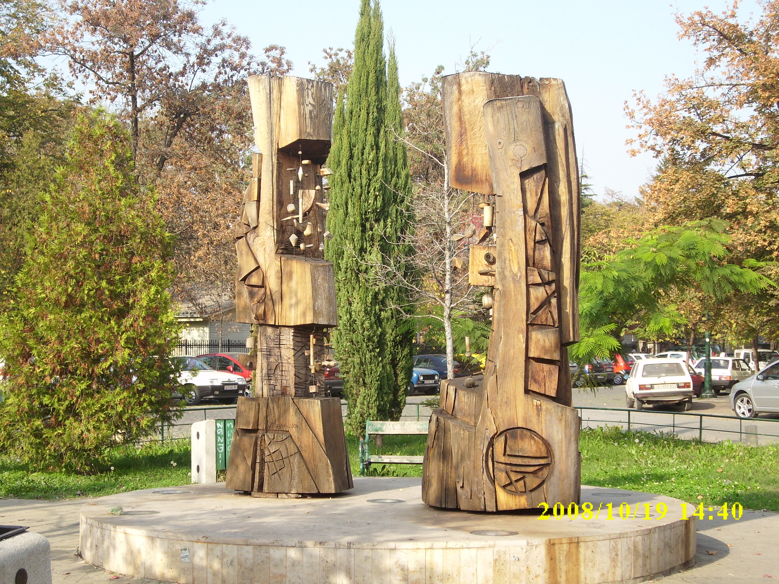 Дрвен споменик во скопската населба Дебар Маало